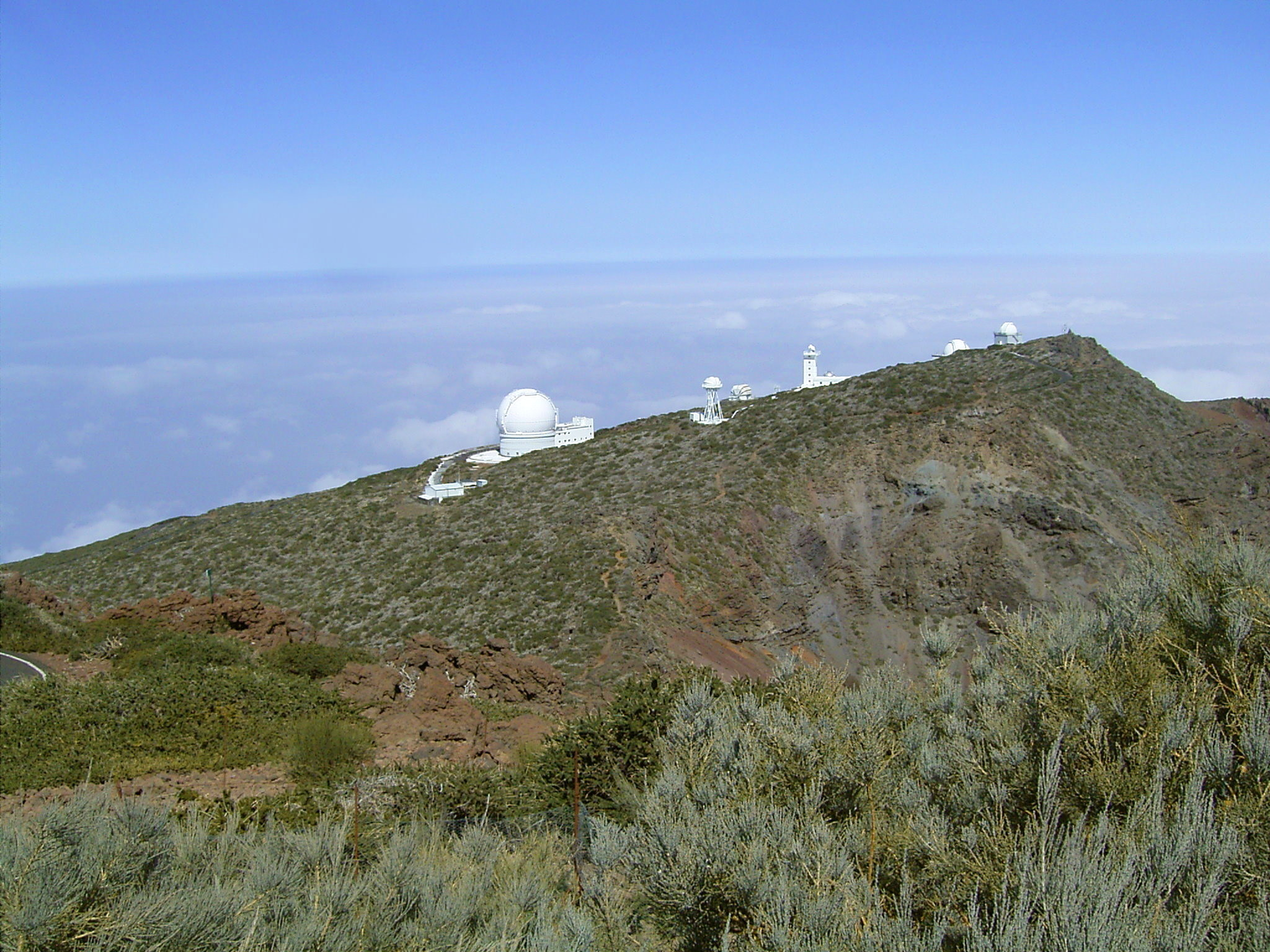 Roque de los Muchachos observatory, La Palma, Canary Islands